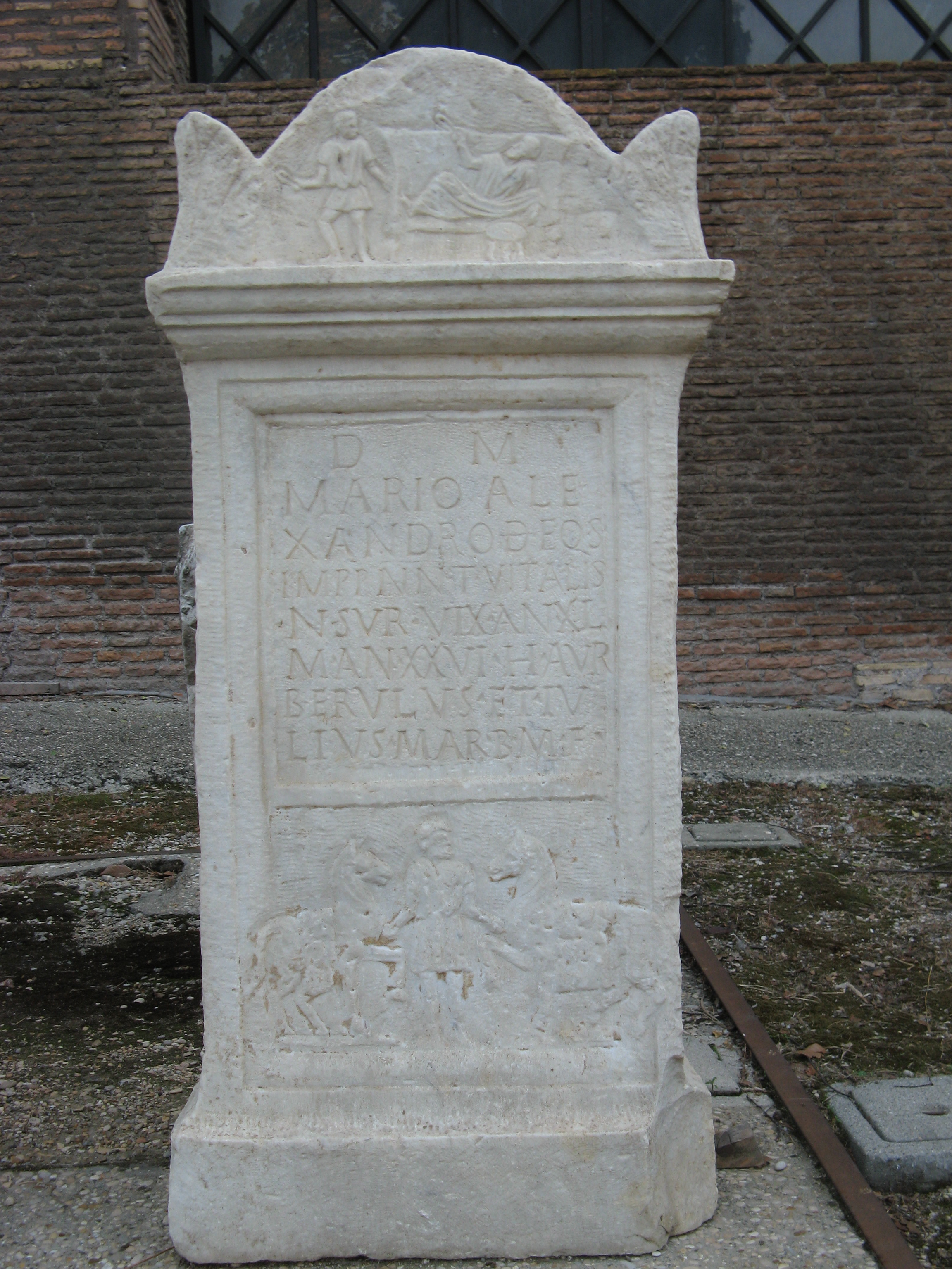 Inscription latine découverte sur la via labicana au cimetière des equites singulares, conservée dans la cour du Musée des Thermes de Dioclétien à Rome. Photographiée en 2008. Le texte se lit : « D(iis) M(anibus), / Mario Ale/xandro d(ecurioni) eq(uitum) s(ingularium) / impp(eratorum) nn(ostrorum), t(urma) Vitalis, / n(atione) Sur(us), vix(it) an(nos) XL, / m(ilitavit) ann(os) XXVI, h(eredes) Aur(elius) / Berulus et Iu/lius Mar(ullus) b(ene) m(erenti) f(ecerunt) »(« Aux Dieux Mânes. À Marius Alexander, décurion des cavaliers gardes du corps (equites singulares) de nos deux empereurs, (servant dans la) turme (escadron) de Vitalis, originaire de Syrie, il a vécu 40 ans, a fait 26 ans de service, ses héritiers, Aurelius Berulus et Iulius Marullus onf fait (réaliser ce monument pour lui) qui le méritait bien »).L’inscription date du troisième siècle. Référence de l’inscription AE 1982, 76 ; EDH : HD001300 ; M.P.Speidel, Die Denkmäler der Kaiserreiter. Equites singulares Augusti (Köln 1994), no. 524.